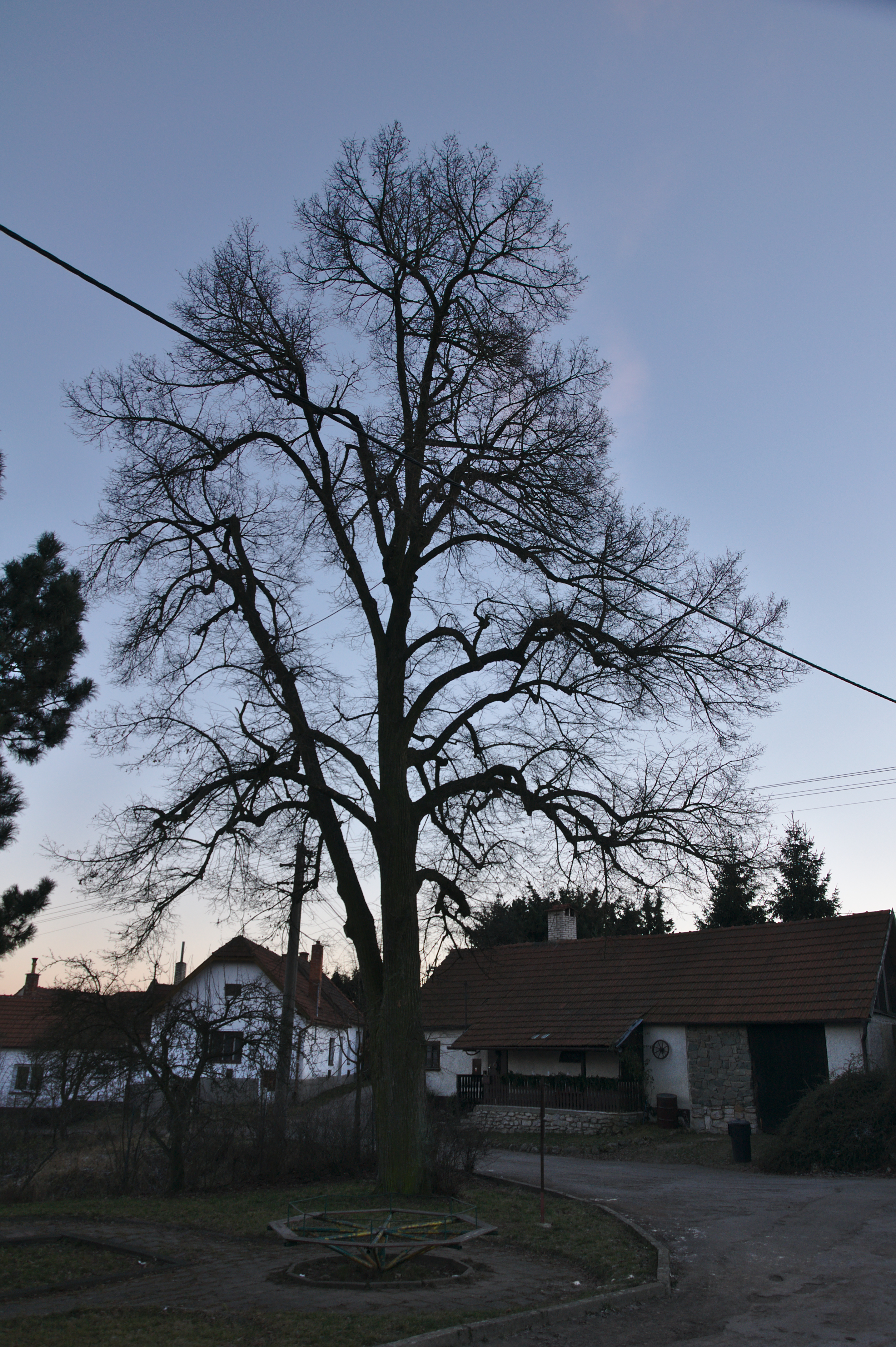 Vavřinecká lípa, Vavřinec, okres Blansko